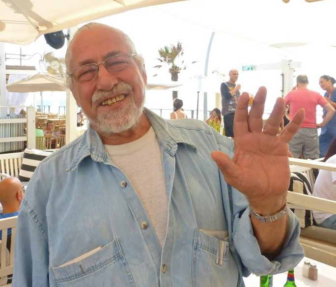 שאול נמרי הוא צייר ופסל ישראלי.